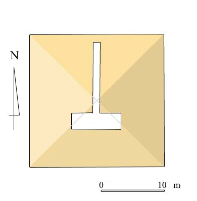 Satellite Pyramid of Khafre Kultpyramide der Chephren-Pyramide Plan et coupe de la pyramide satellite du complexe funéraire de Khéphren